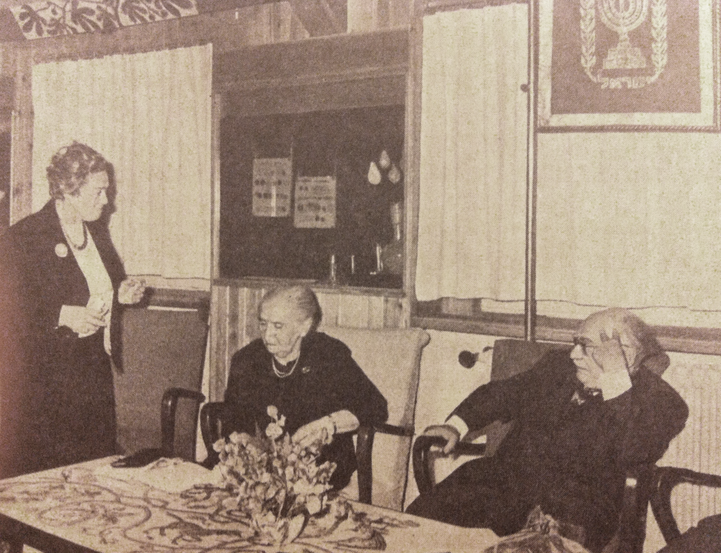 שולמית קליבנוב בבית הנשיא, 1964